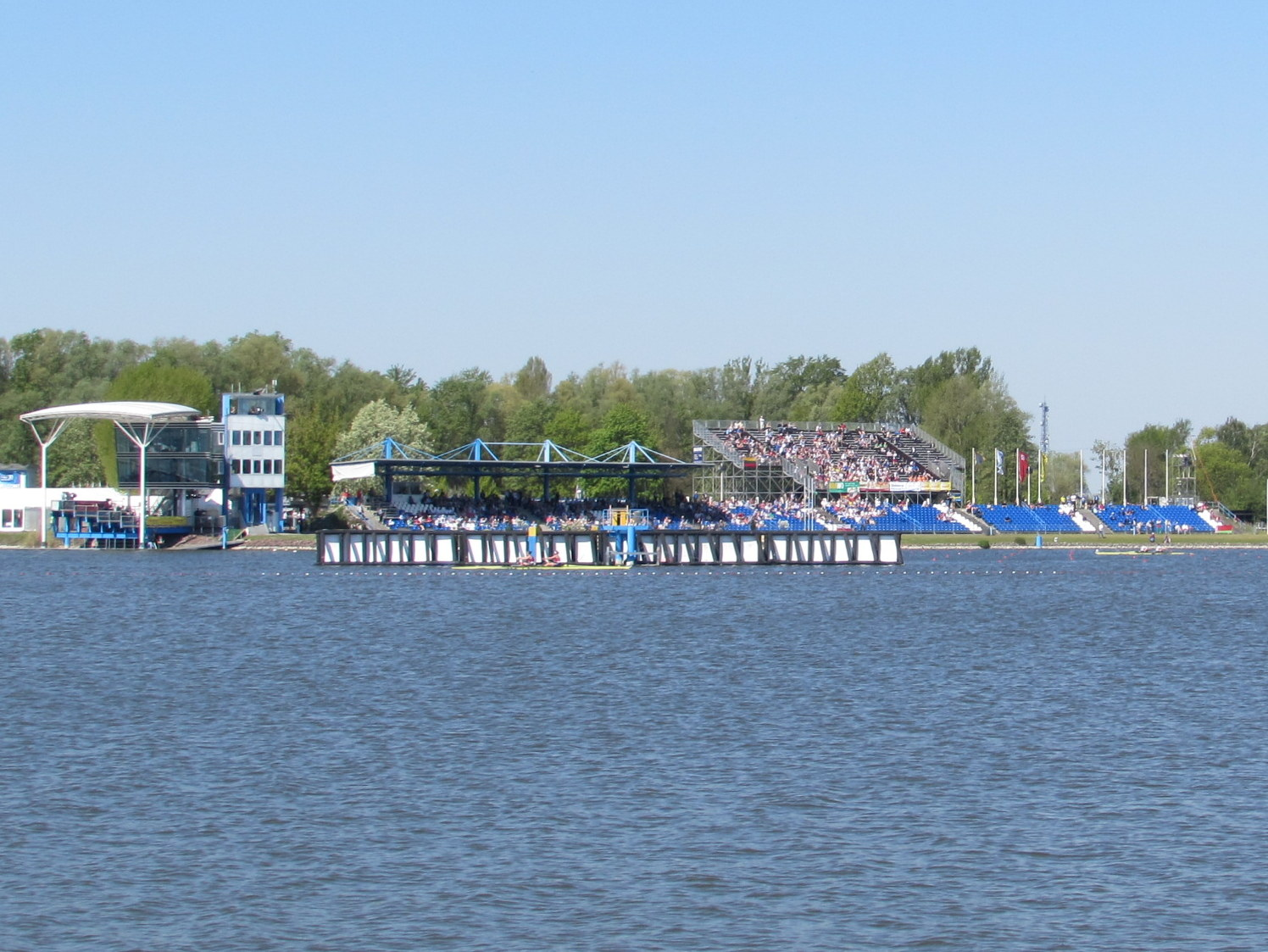 Zuschauertribünen und Kampfrichterturm der Regattastrecke Beetzsee zur Ruder-Europameisterschaft 2016; zweiter Wettkampftag